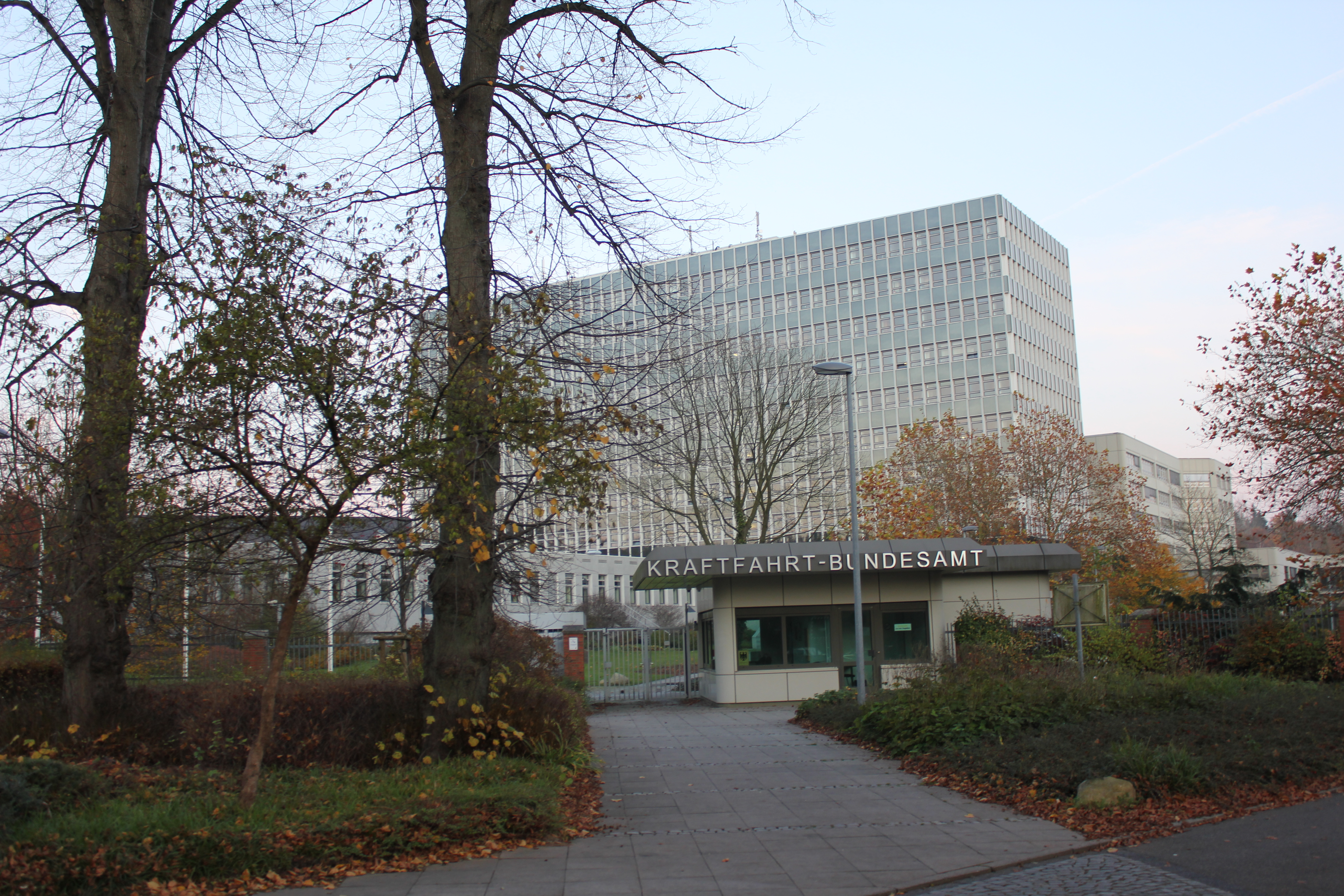 Kraftfahrt-Bundesamt (KBA), Flensburg 2011, Bild 2